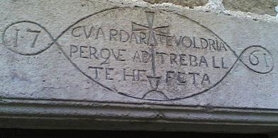 Llinda Can Bellestoles Santa Pau, Garrotxa, Catalunya